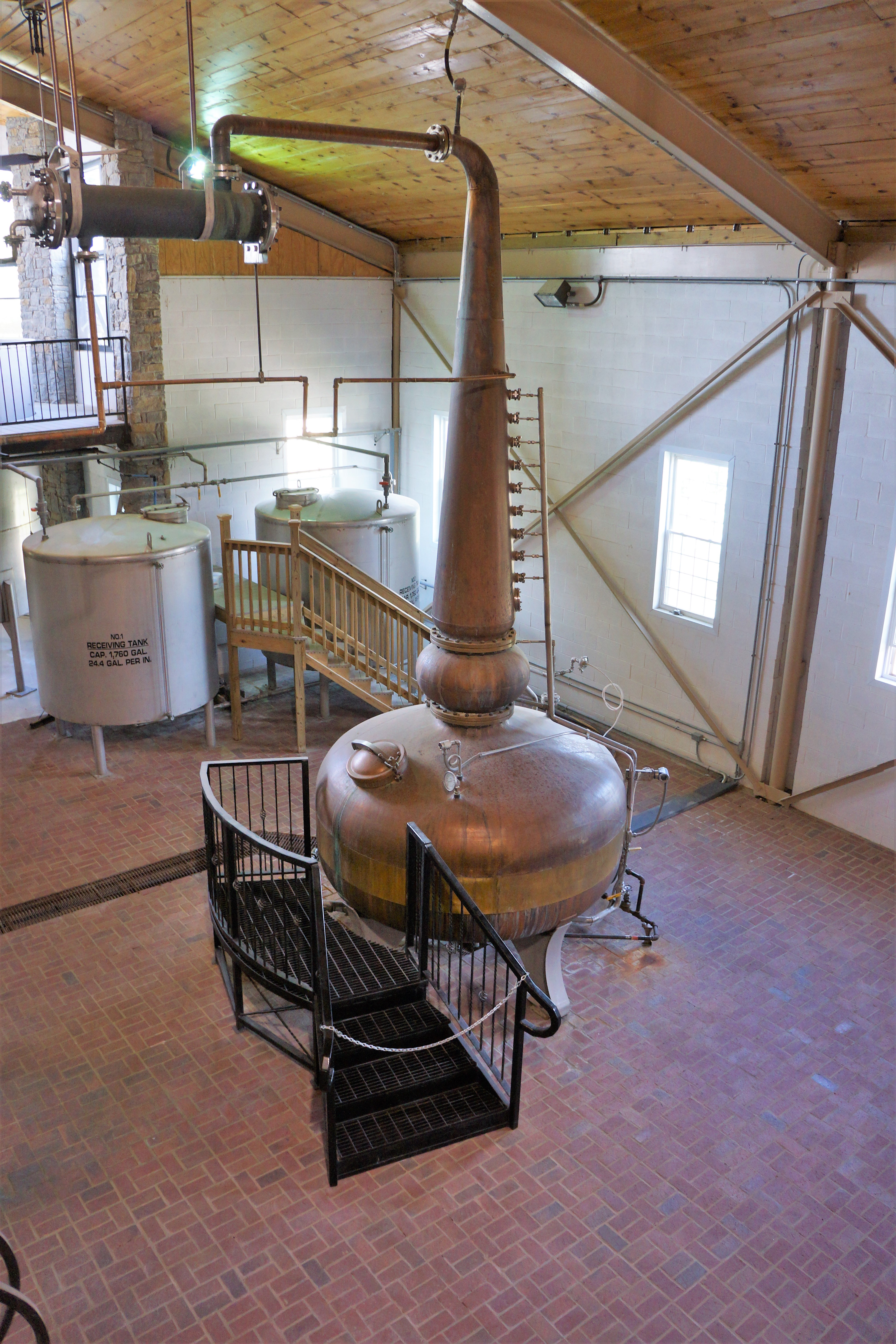 The iconic pot still from Willett Distillery